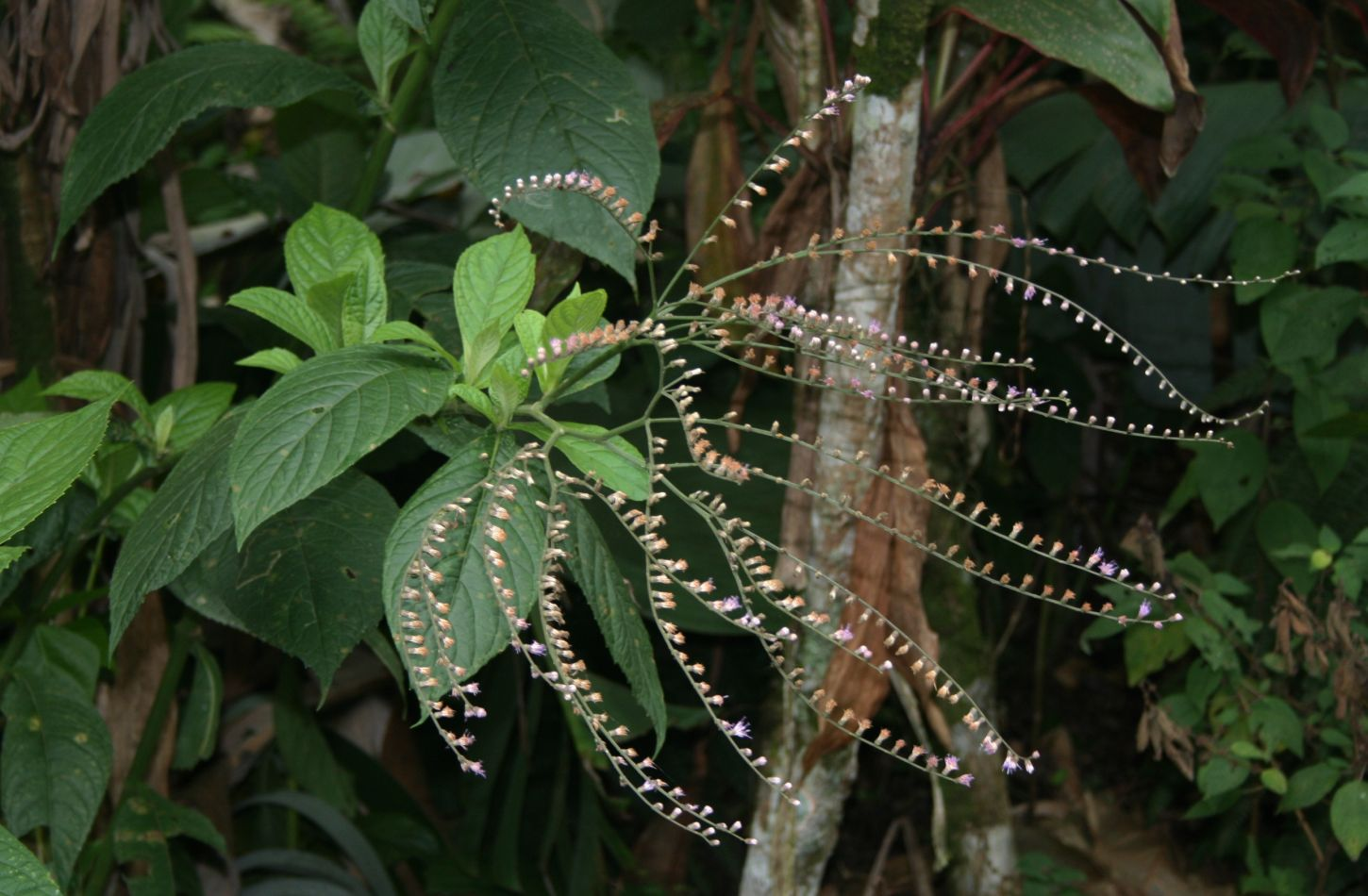 Eirmocephala brachiata (= Vernonia brachiata), Korbblütler (Asteraceae) - Costa Rica: Prov. Cartago, Orosi